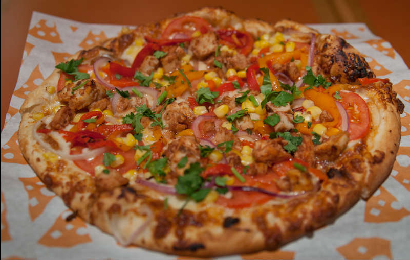 ZBQ barbeque chicken pizza from Zpizza